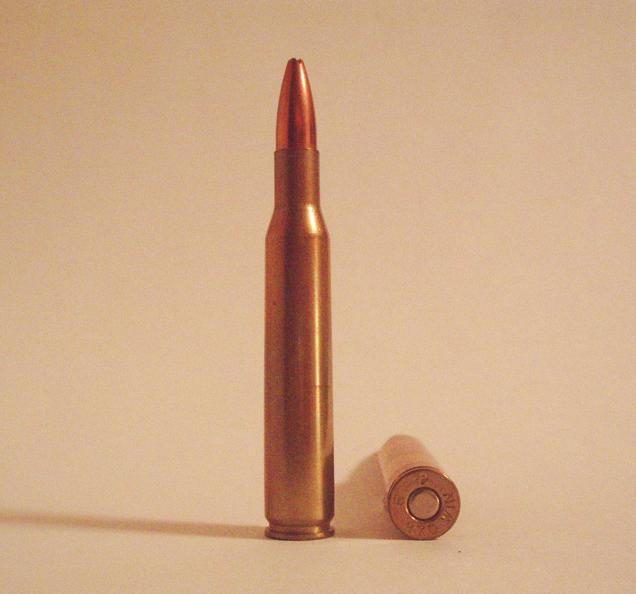 .270 Winchester (130 grain)